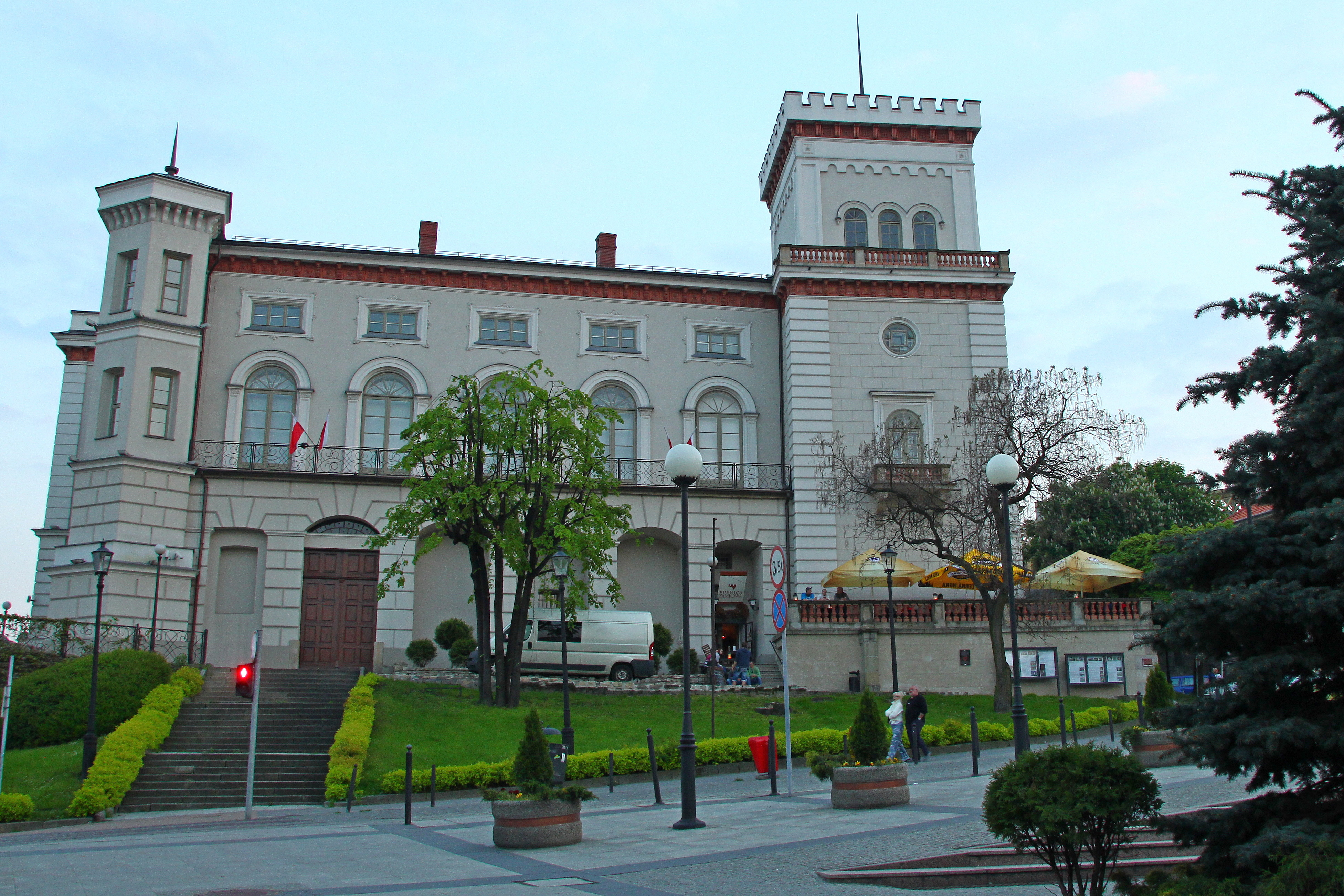 Bielsko-Biała, zamek Sułkowskich (książęcy), ob. muzeum, XIV, XIX w.